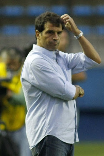 Milton Cruz dirigindo a equipe do São Paulo em 2010.